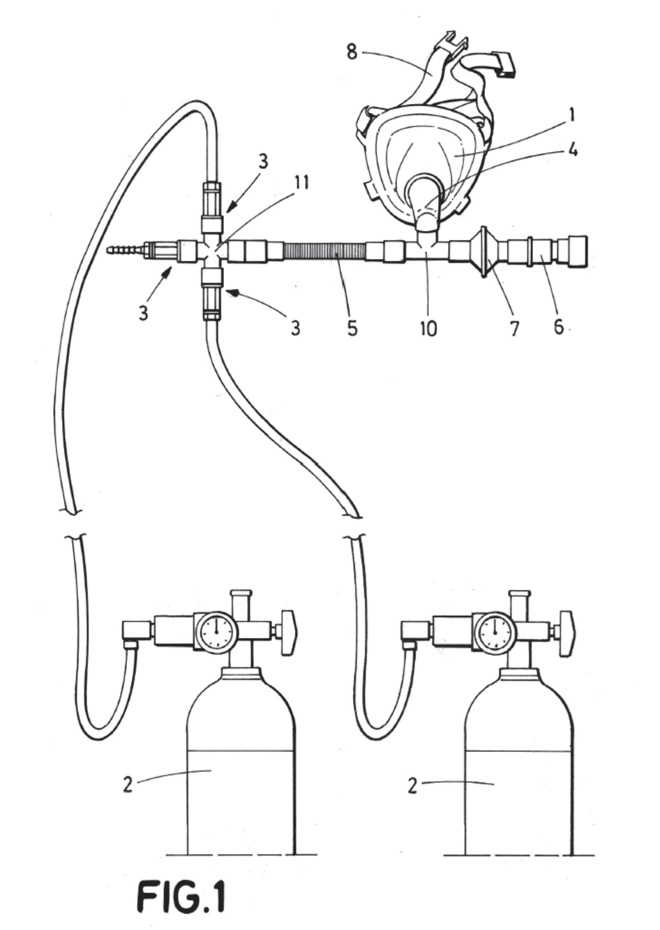 BOLIFE ONE CPOP (the URL doesn't exist)